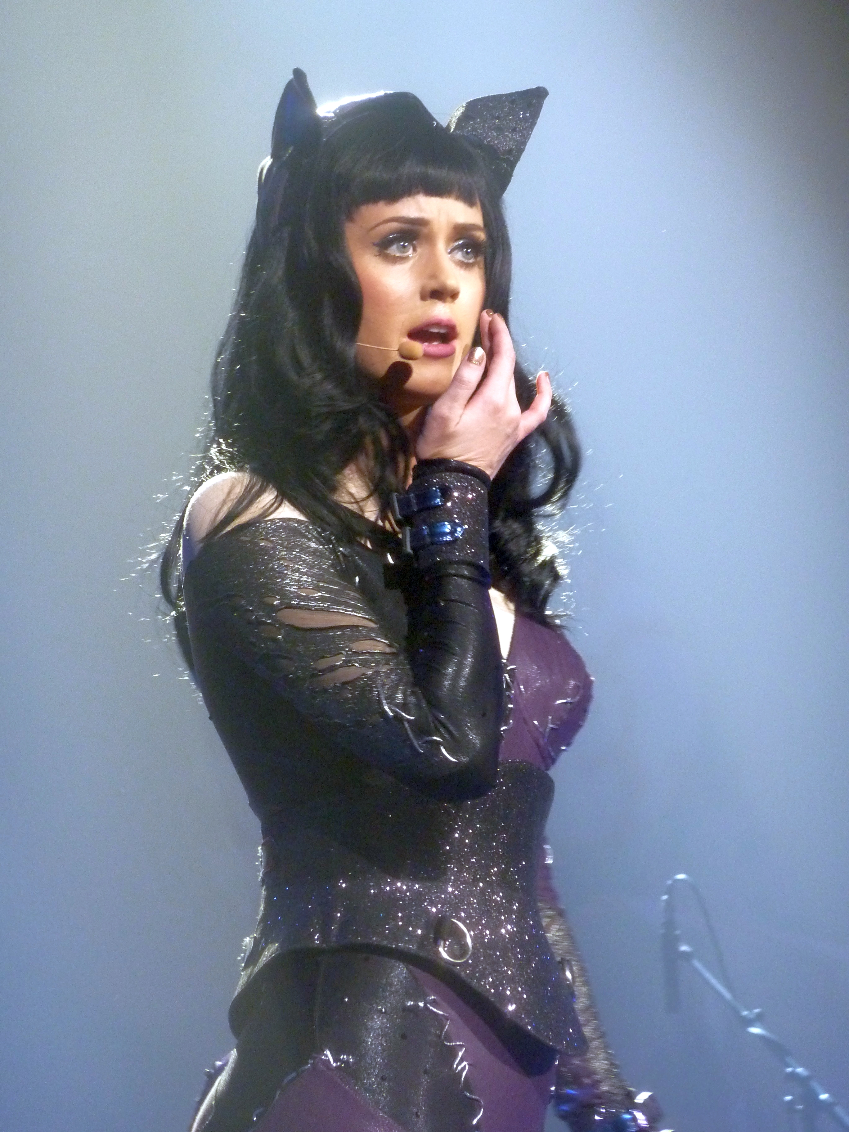 Katy Perry en concert le 08 mars 2011 au Zenith de Paris dans le cadre de sa tournée " California Dreams Tour ".